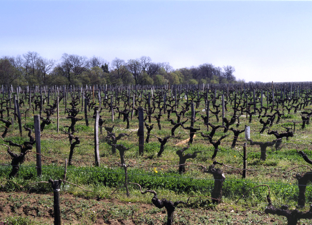 Vignes / Weinberge / Vineyards, Saint-Michel-de-Montaigne, Bergerac, France